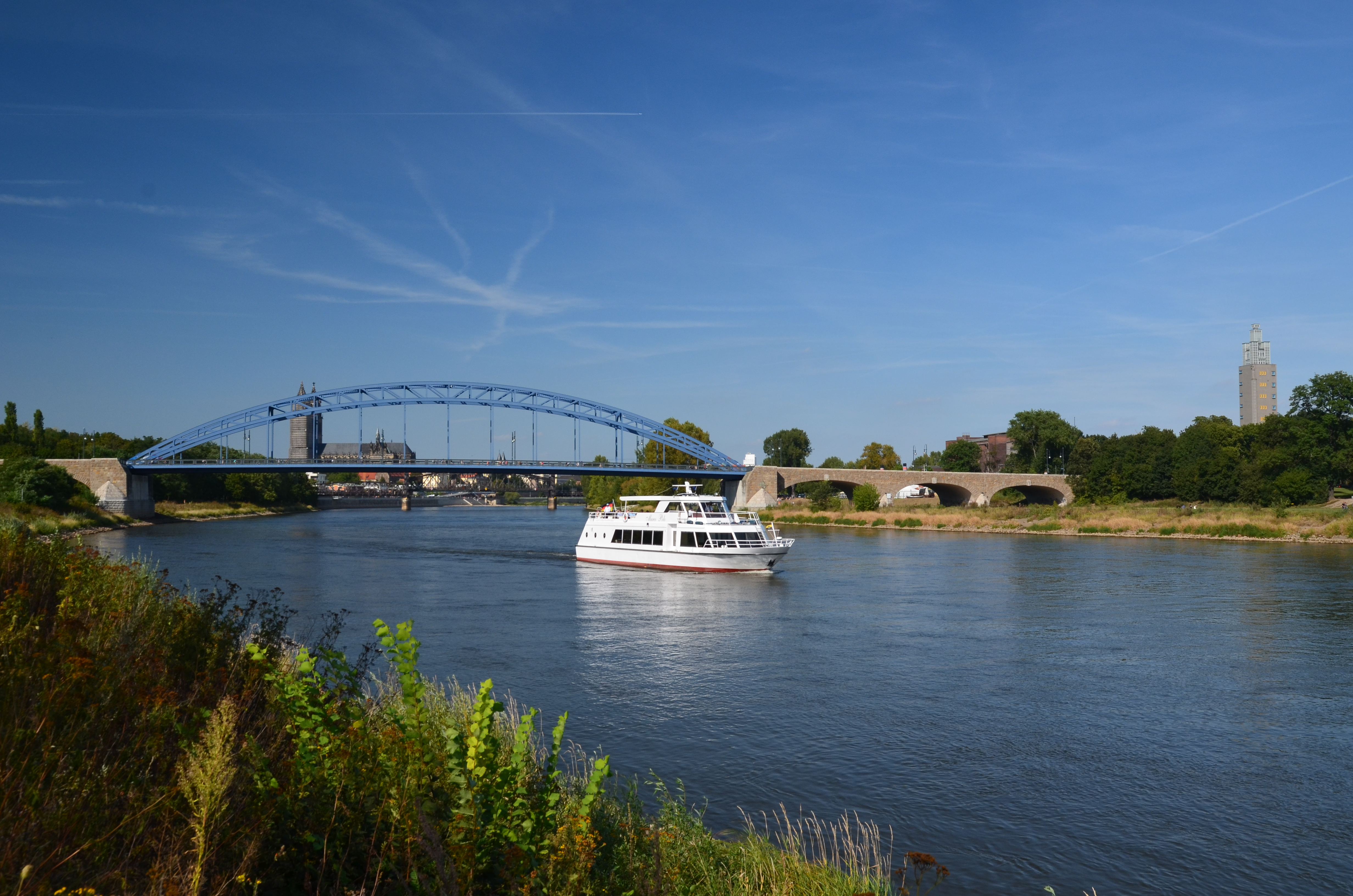 Sternbrücke in Magdeburg